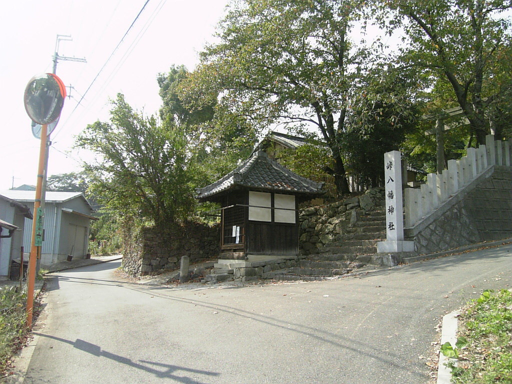 竜田越奈良街道（大阪府柏原市峠）